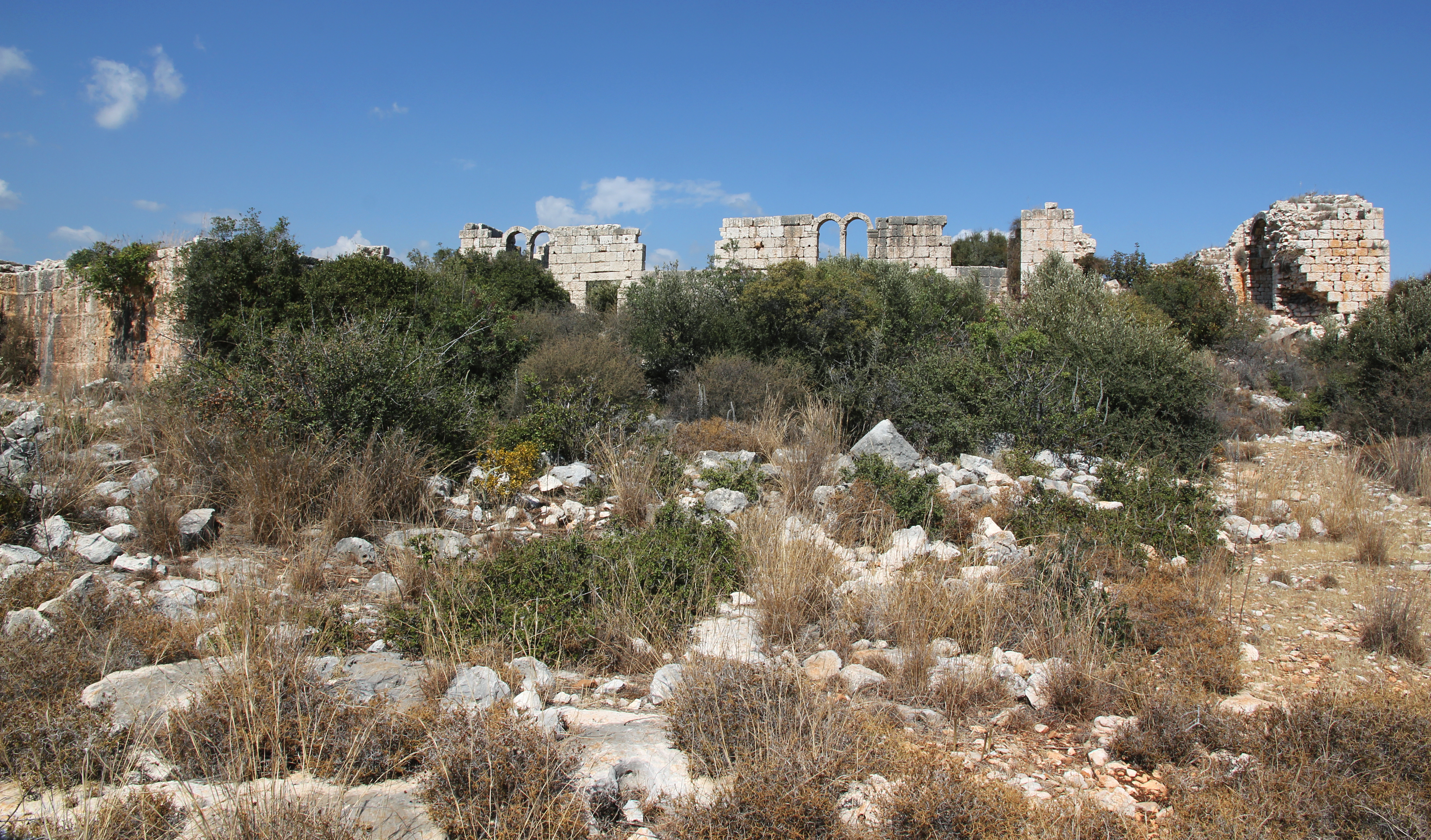 Korykos, archäologischer Fundort in der Südtürkei, Querschiffbasilika von Süden